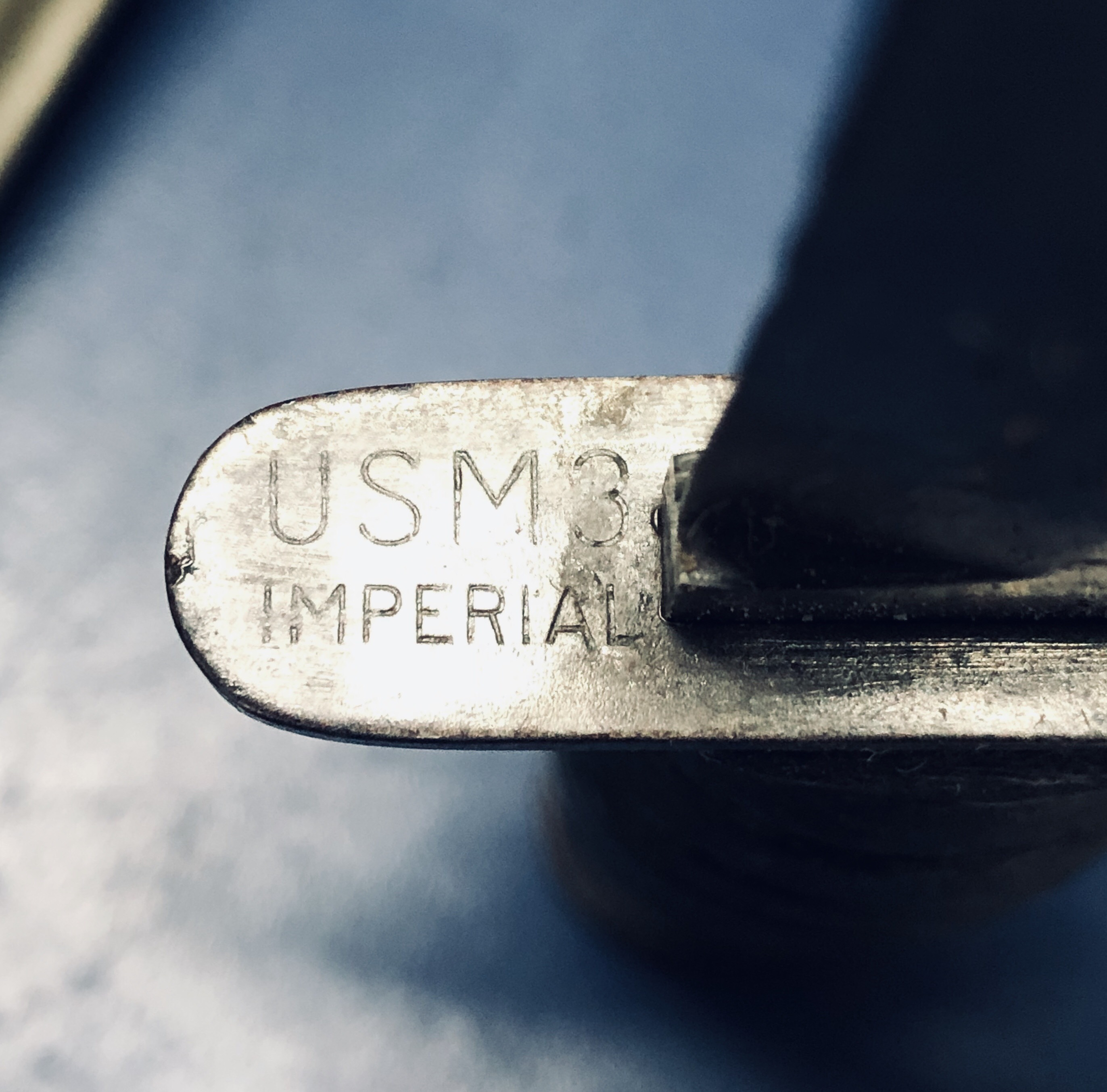 M3 knife imperial